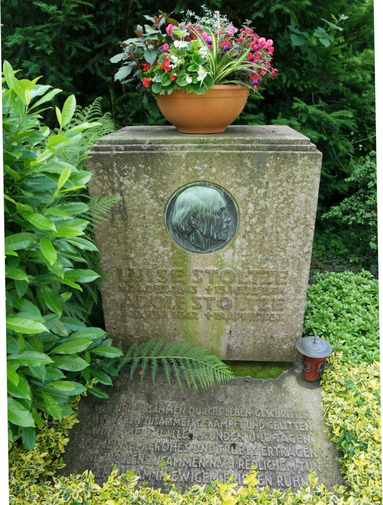 Grab des Journalisten und Schriftstellers Carl Adolph Stoltze (1842-1933) auf dem Hauptfriedhof in Frankfurt am Main